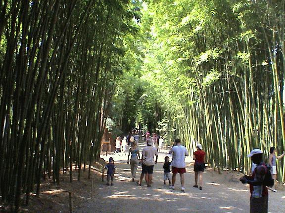 Paseo principal de la Bambuseria de Anduze